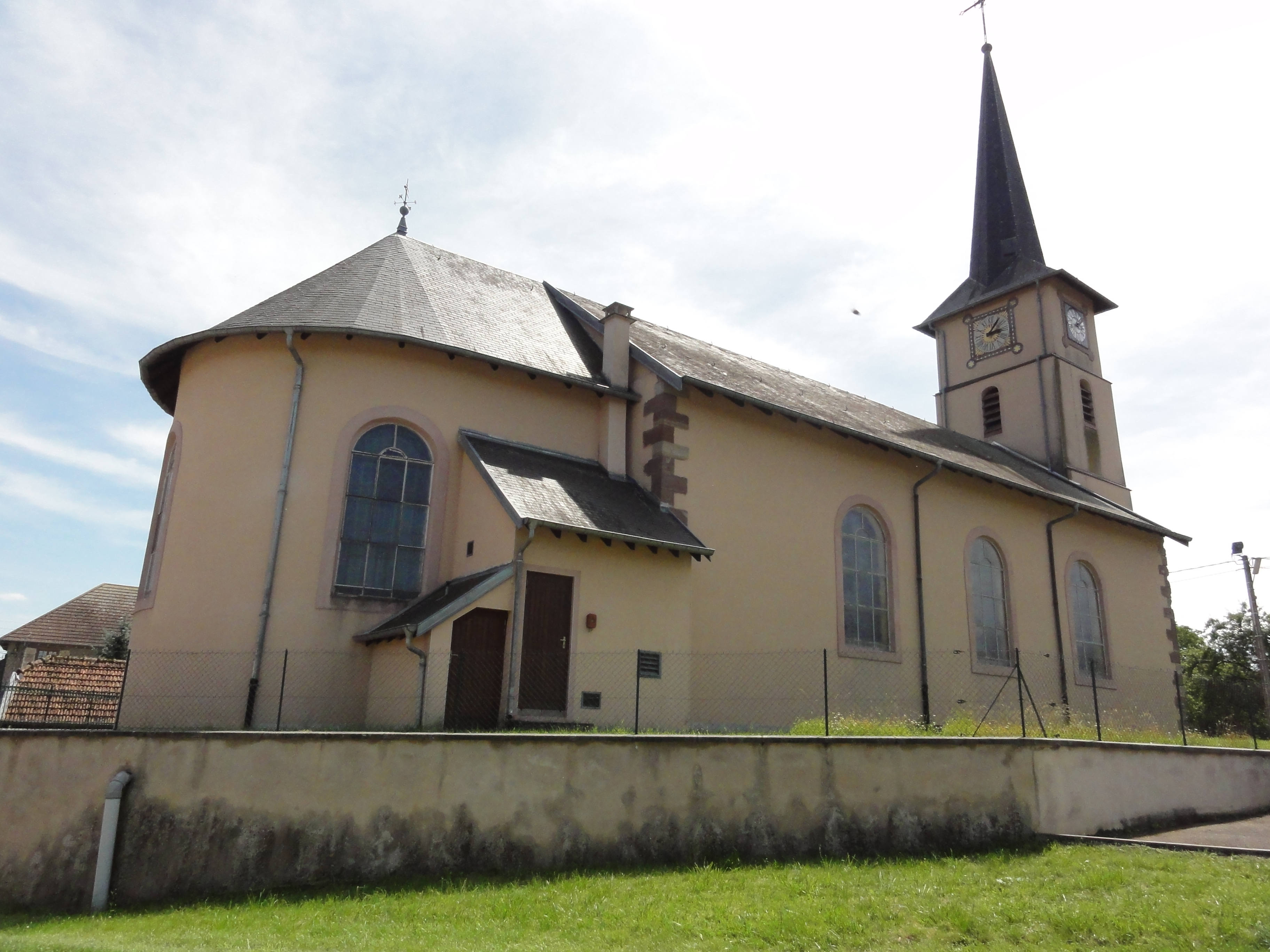 Sainte-Pôle (M-et-M) église